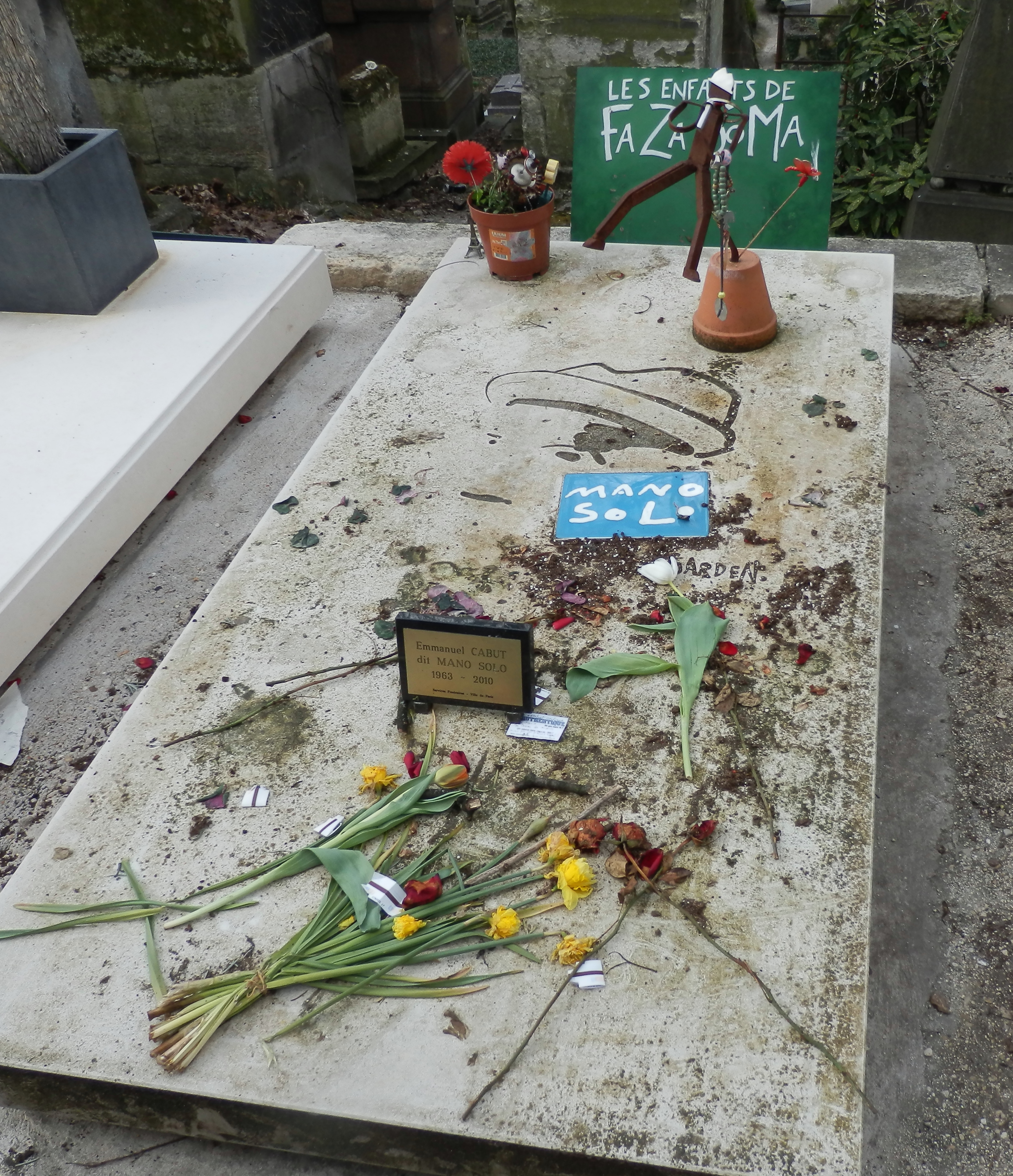 Grabstein von Mano Solo auf dem Friedhof Père Lachaise 2013